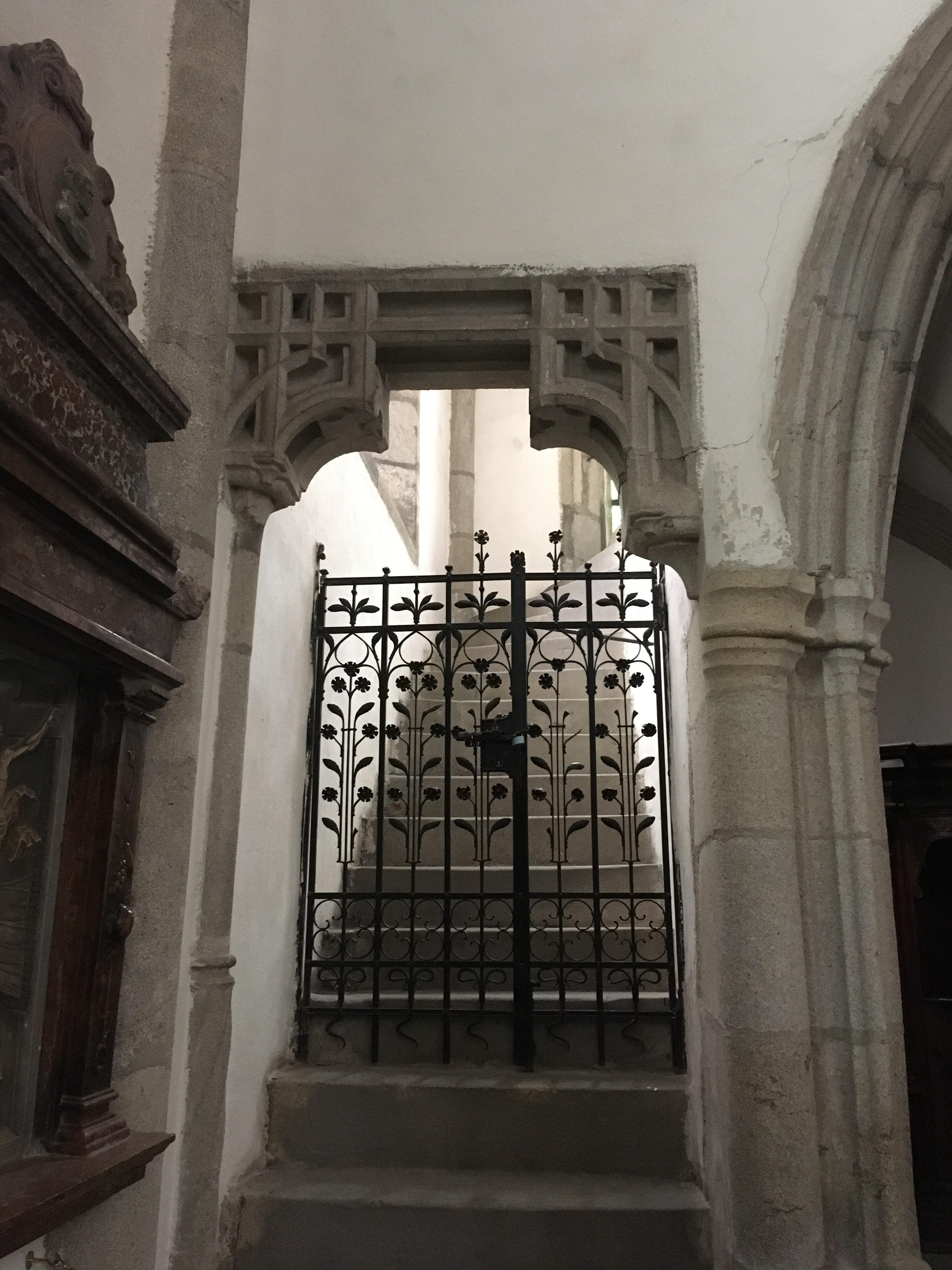 Портал емпори костела святого Віта в Чеському Крумлові